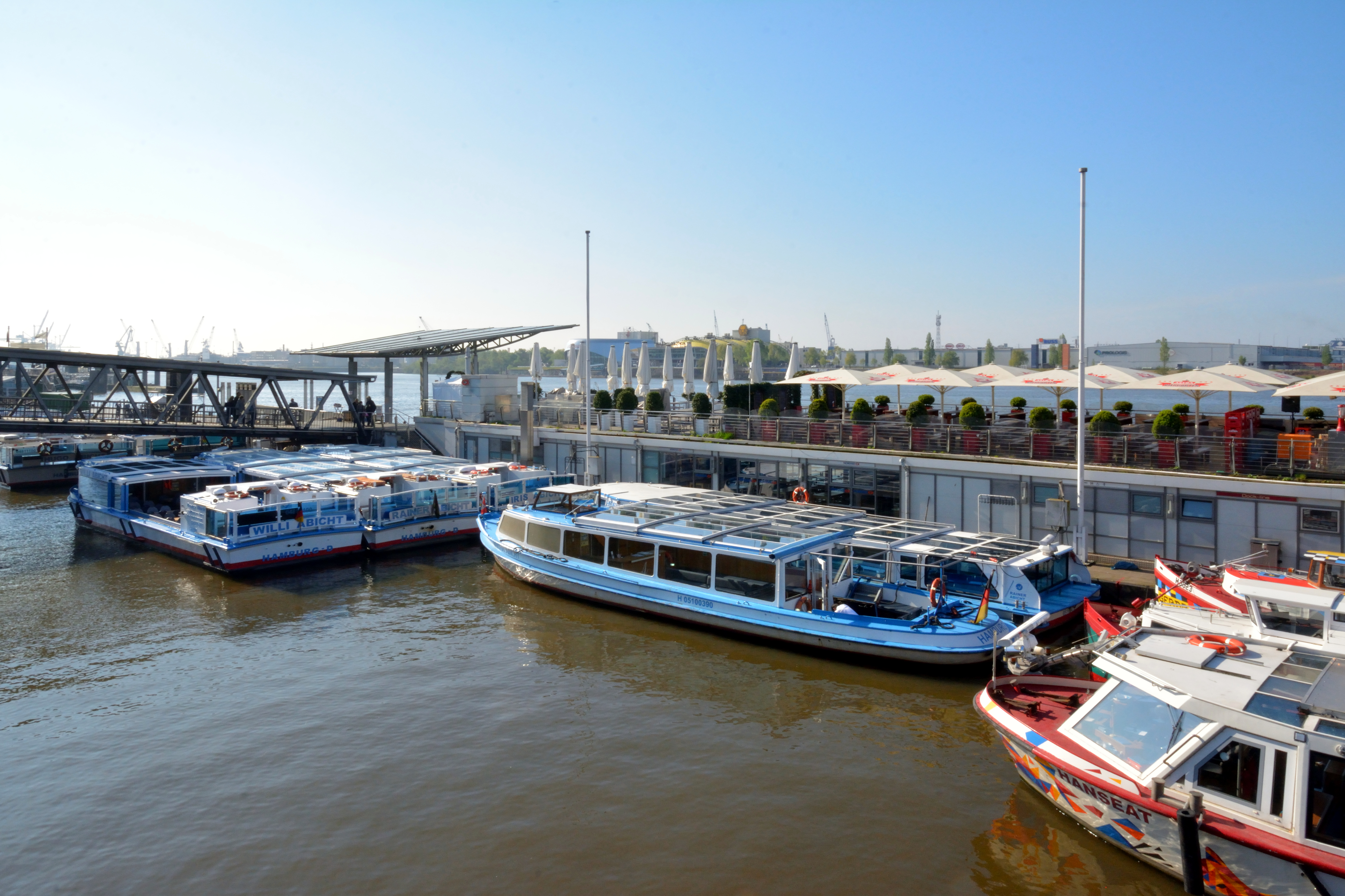 Impressionen eines Wochenendes in Hamburg mit dem Titel: Wikipedia:Ahoi Fotos der Barkassenfahrt am Samstag im Hamburger Hafen.